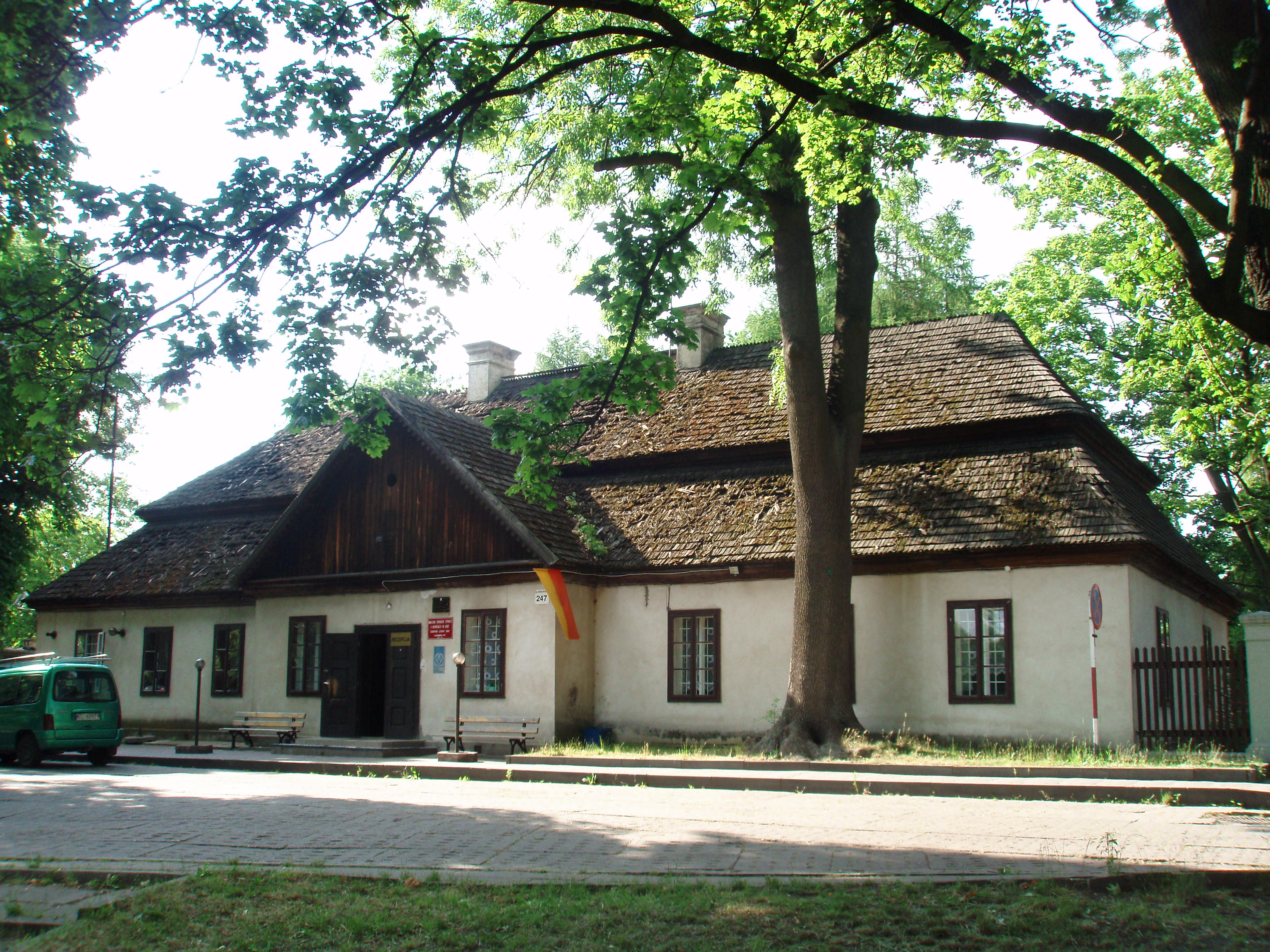 dom, ulica Rzgowska nr 247 w Łodzi, k. XVIII, nr rej.: 135-VII-14 z 30.08.1946, ZS/1/17 z 9.03.1964 oraz A/17 z 20.01.1971 nr rej.: A/118 z 20.01.1971